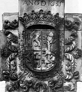 Escudo de las Encartaciones en la Casa de Juntas, usado también como armas municipales de Sopuerta